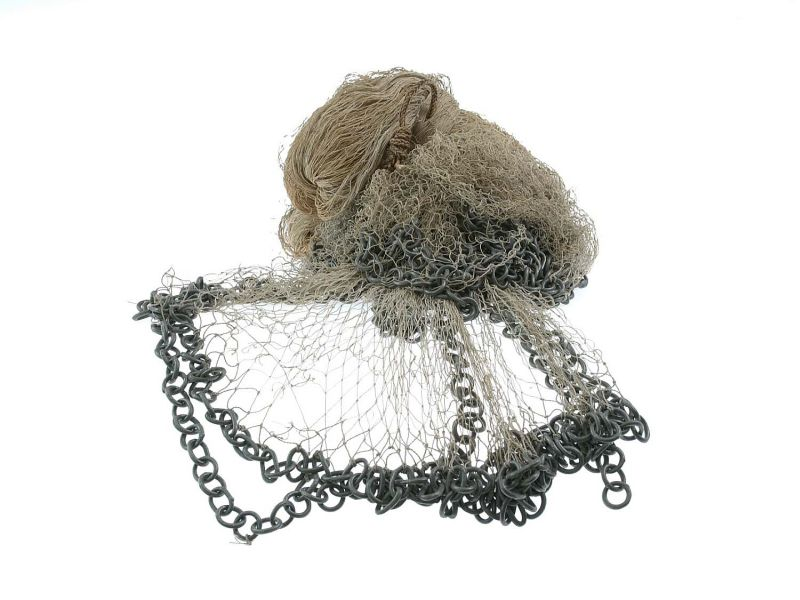 Visnet. Werpnet Unknown language: Jala